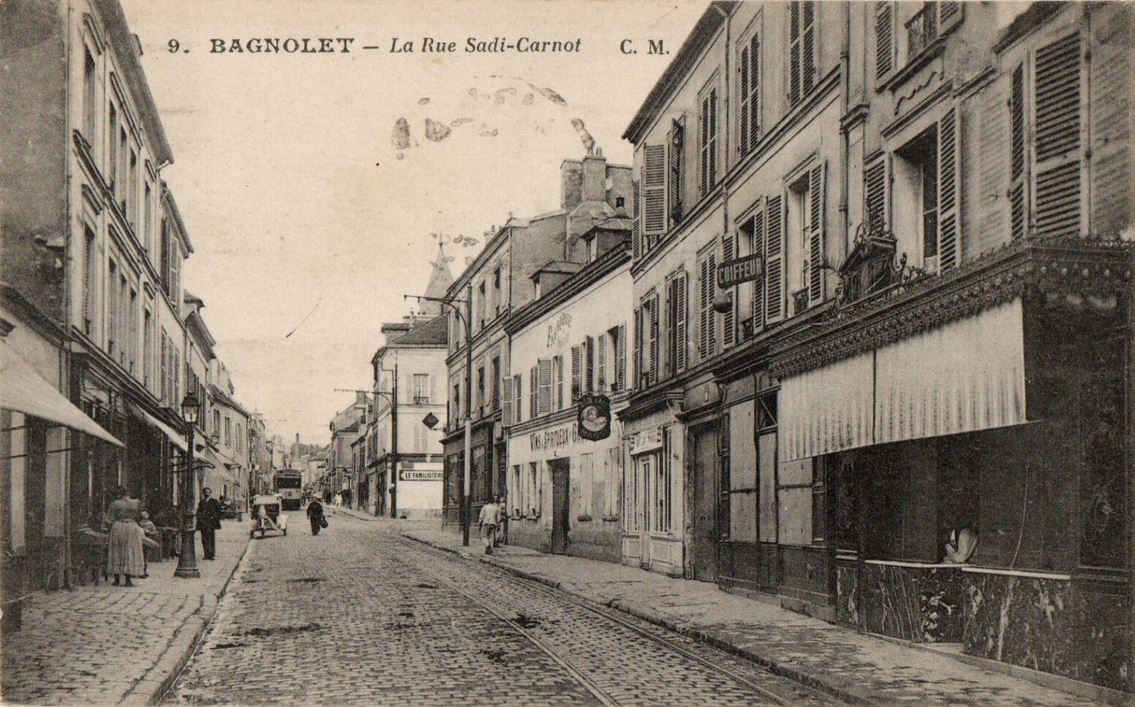 Bagnolet.Rue Sadi-Carnot.Magasins